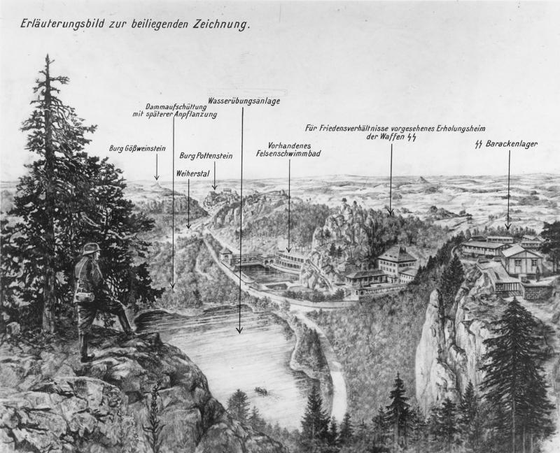 Die Karstschulungsstätte Pottenstein/Oberfranken Ein Bilderatlas mit Erläuterungen Zusammengestellt von SS-Standartenführer Dr. Brand. Erläuterungsbild zur beiliegenden Zeichnung.